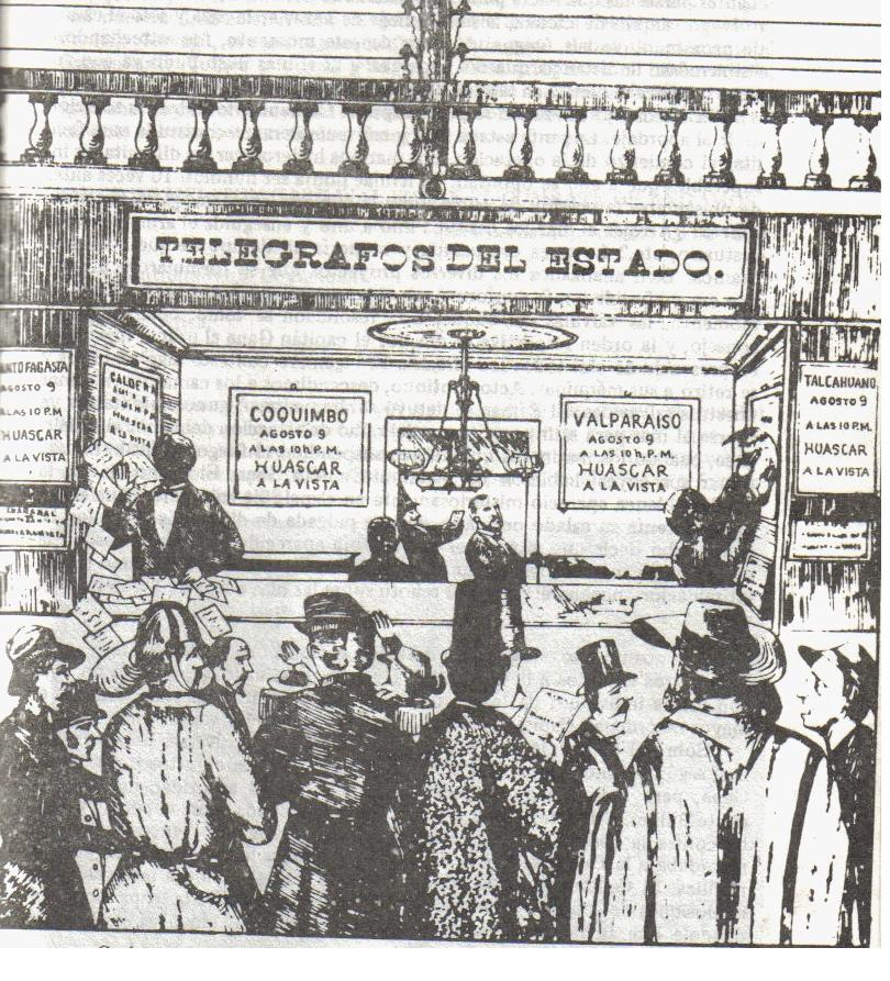 Caricatura peruana sobre las correrias del Huascar